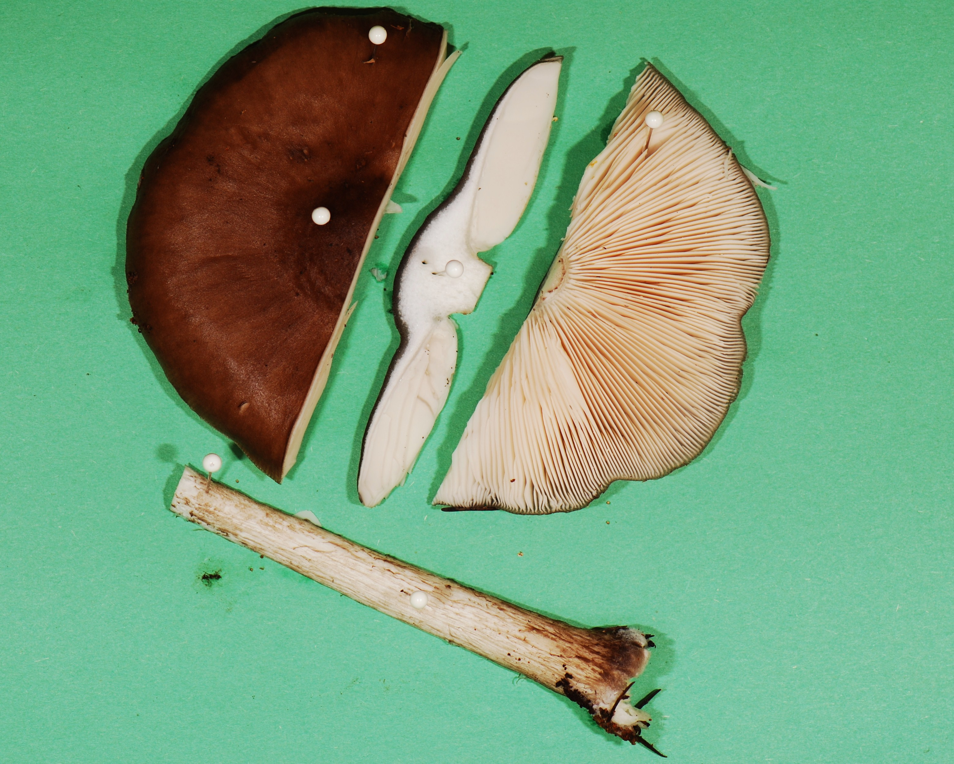 Pluteus cervinus disection